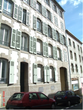 Maison de l'architecte Trischler (1815-1879), Rue Vauban, Brest